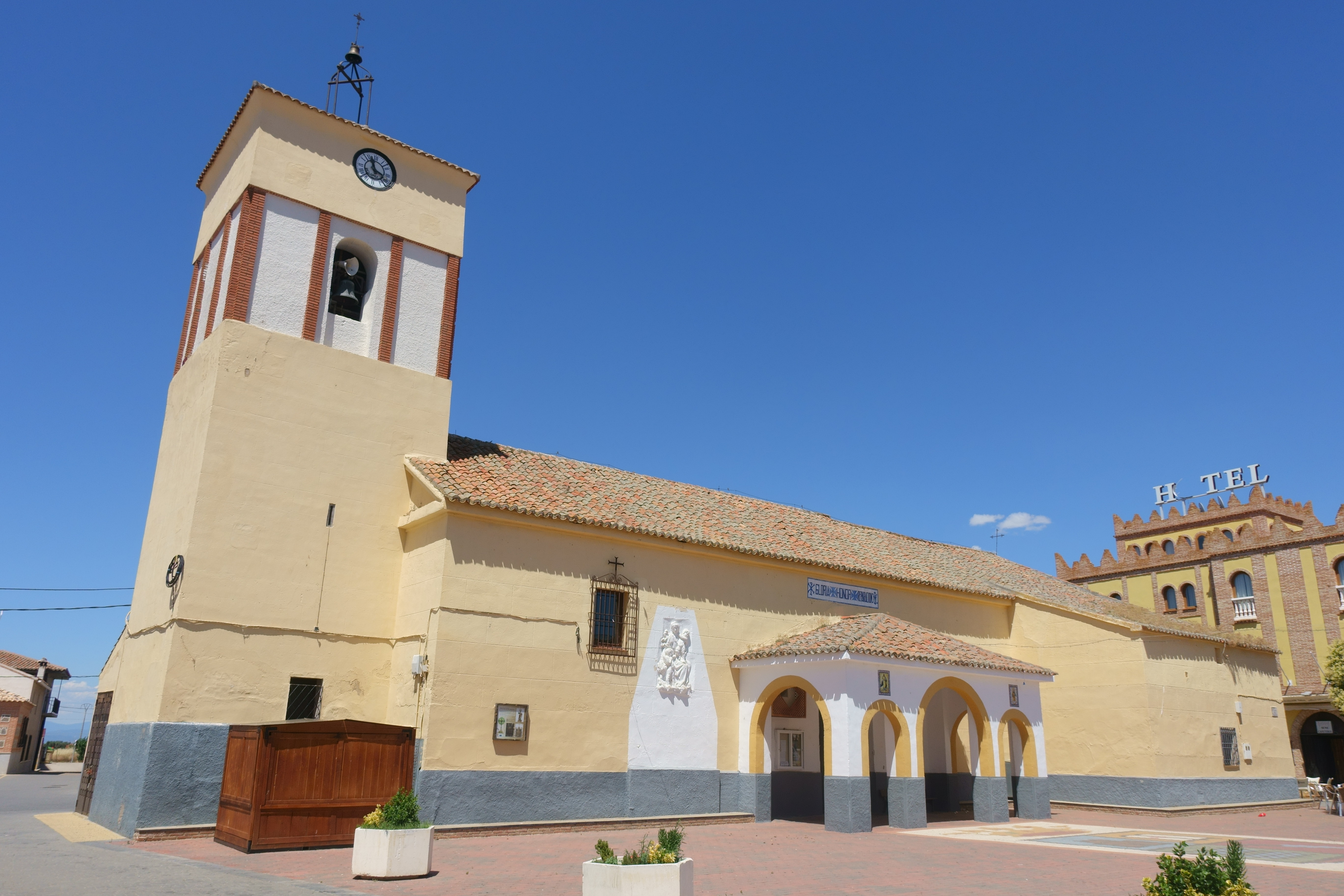 Iglesia de San Bartolomé Apóstol, San Bartolomé de las Abiertas (Toledo, España).